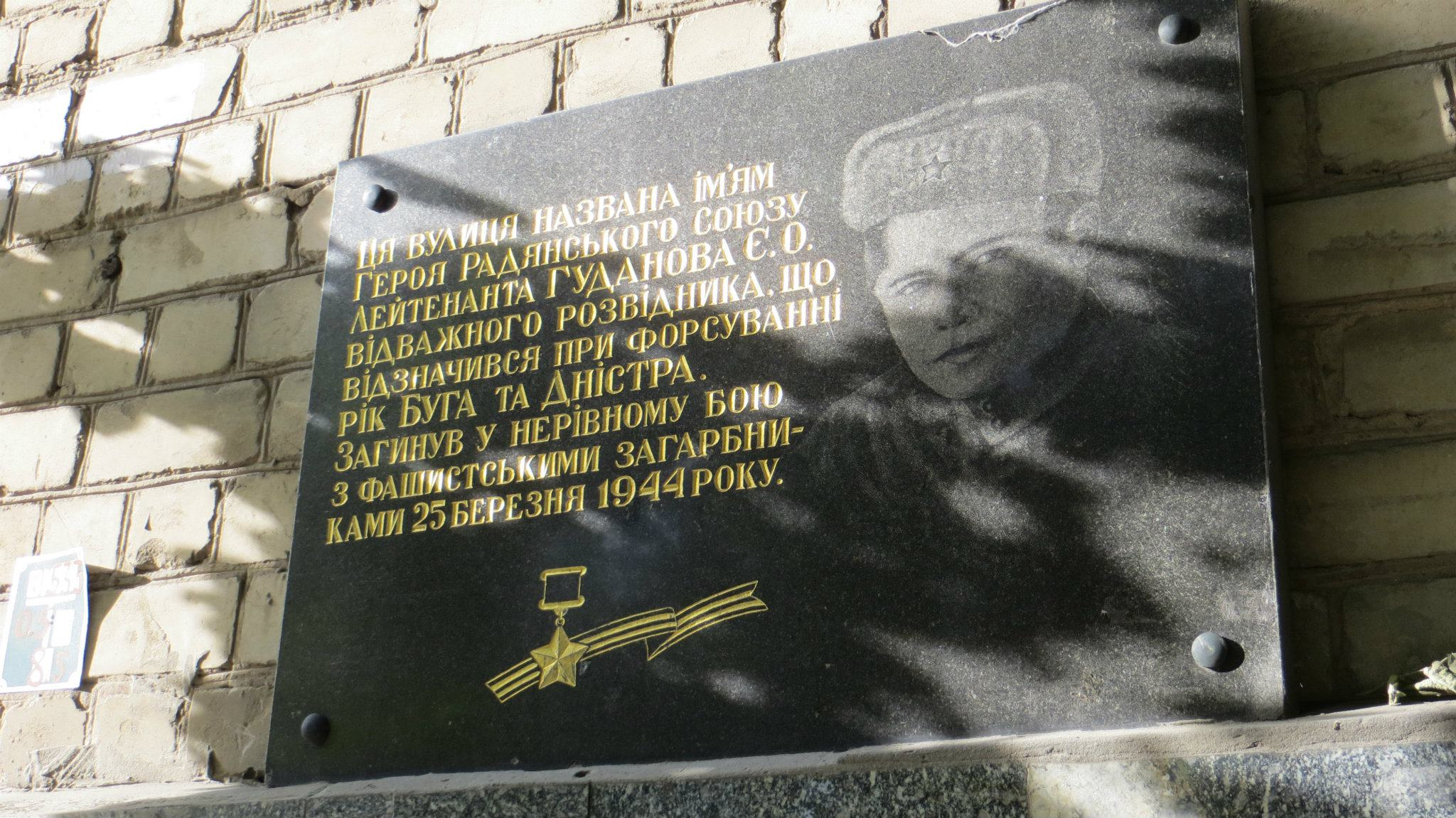 улица Гуданова, 1